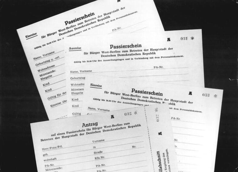 Zentralbild-Repro Ge-Qu 17.12.1963 Zum Passierschein-Abkommen Antragsformular..... auf einem Passierschein für Bürger Westberlins zum Betreten der Hauptstadt der DDR sowie Passierscheine für die Ein- und Ausreise.